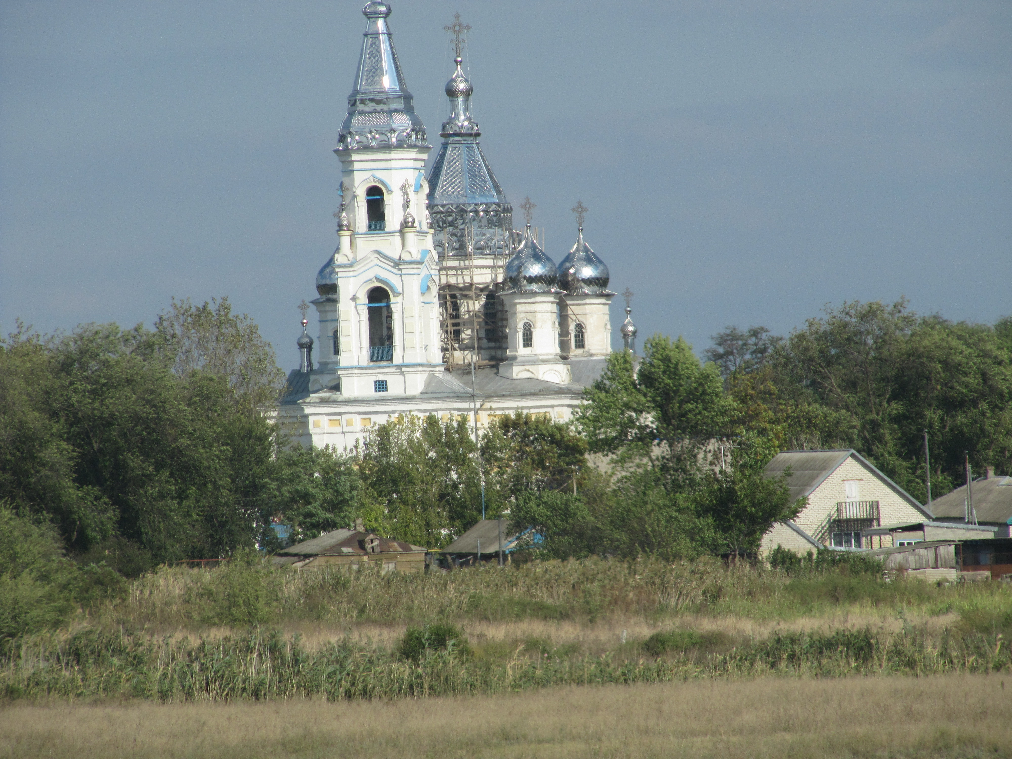 Церковь Николая Чудотворца в селе Дмитриевское, Ставропольский край, Красногвардейский район